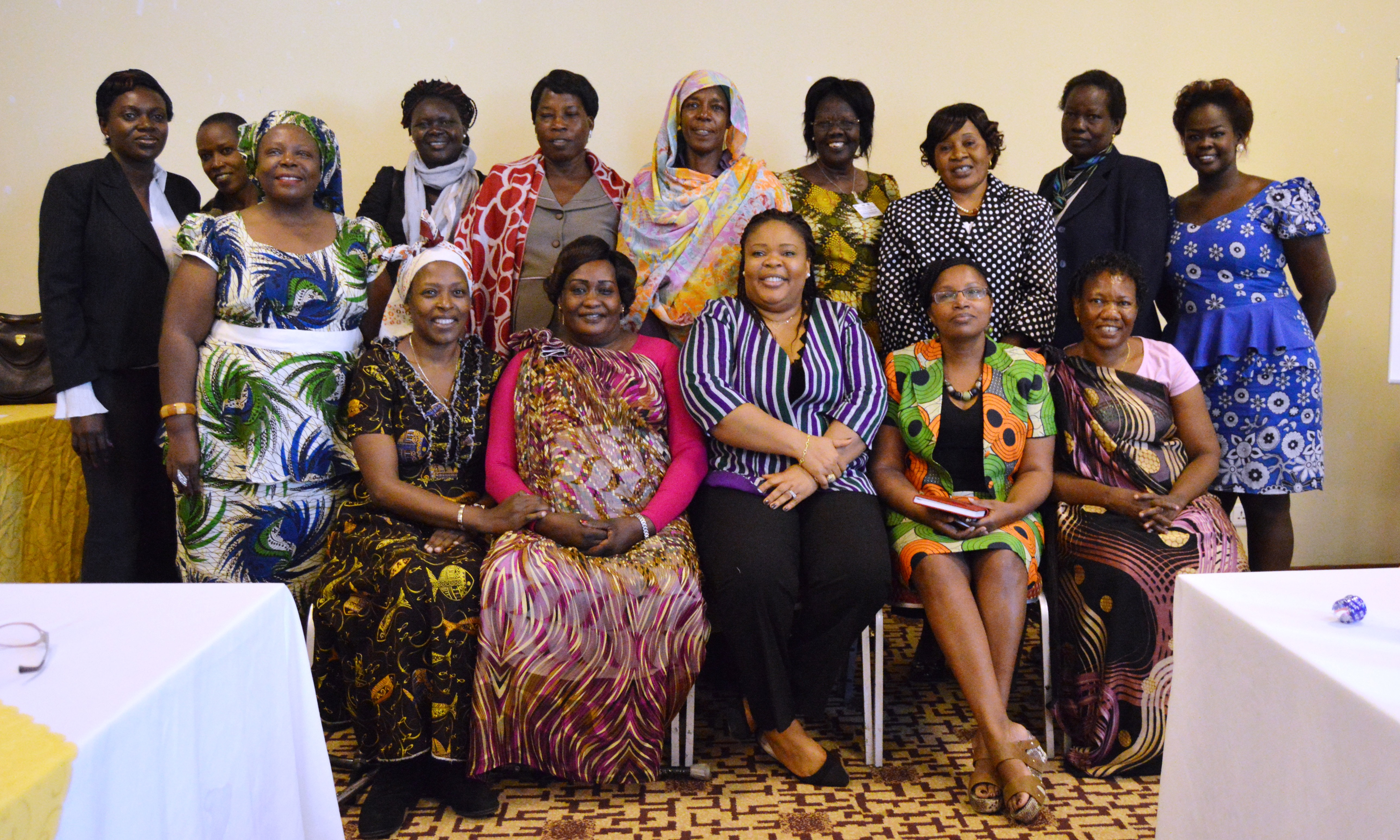 Taskforce members meet with Nobel Peace Prize Laureate Leymah Gbowee (bottom row, center) to discuss peace in South Sudan. اجتماع فريق العمل مع ليما غبوي الحائزة على جائزة نوبل للسلام لمناقشة موضوع السلام في جنوب السودان.